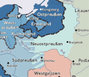 Neuostpreußen, New Eastprussia